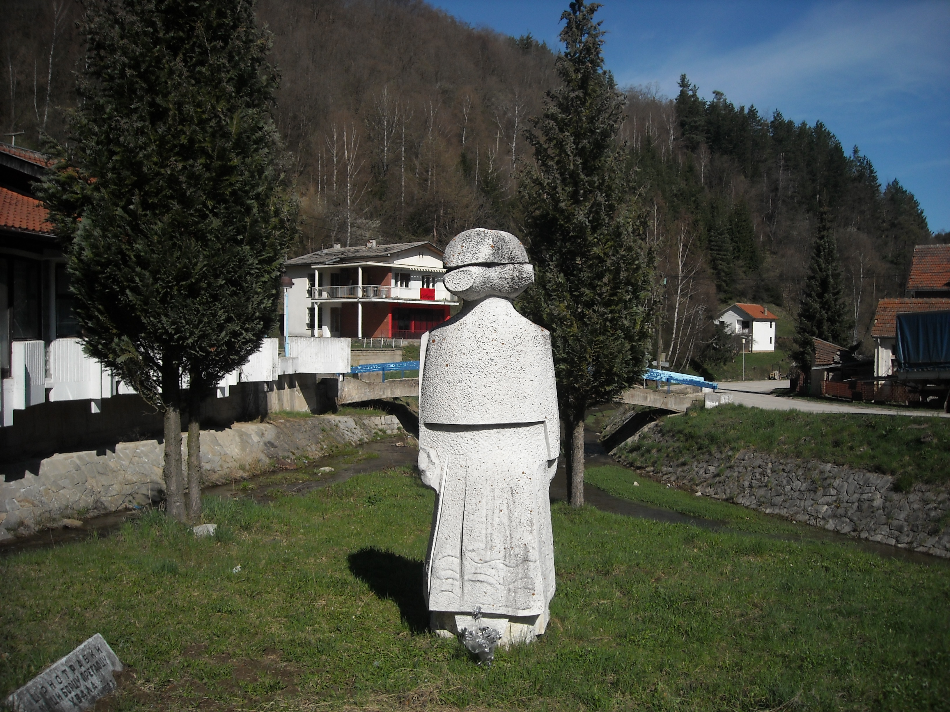 Spomenik Crnotravki